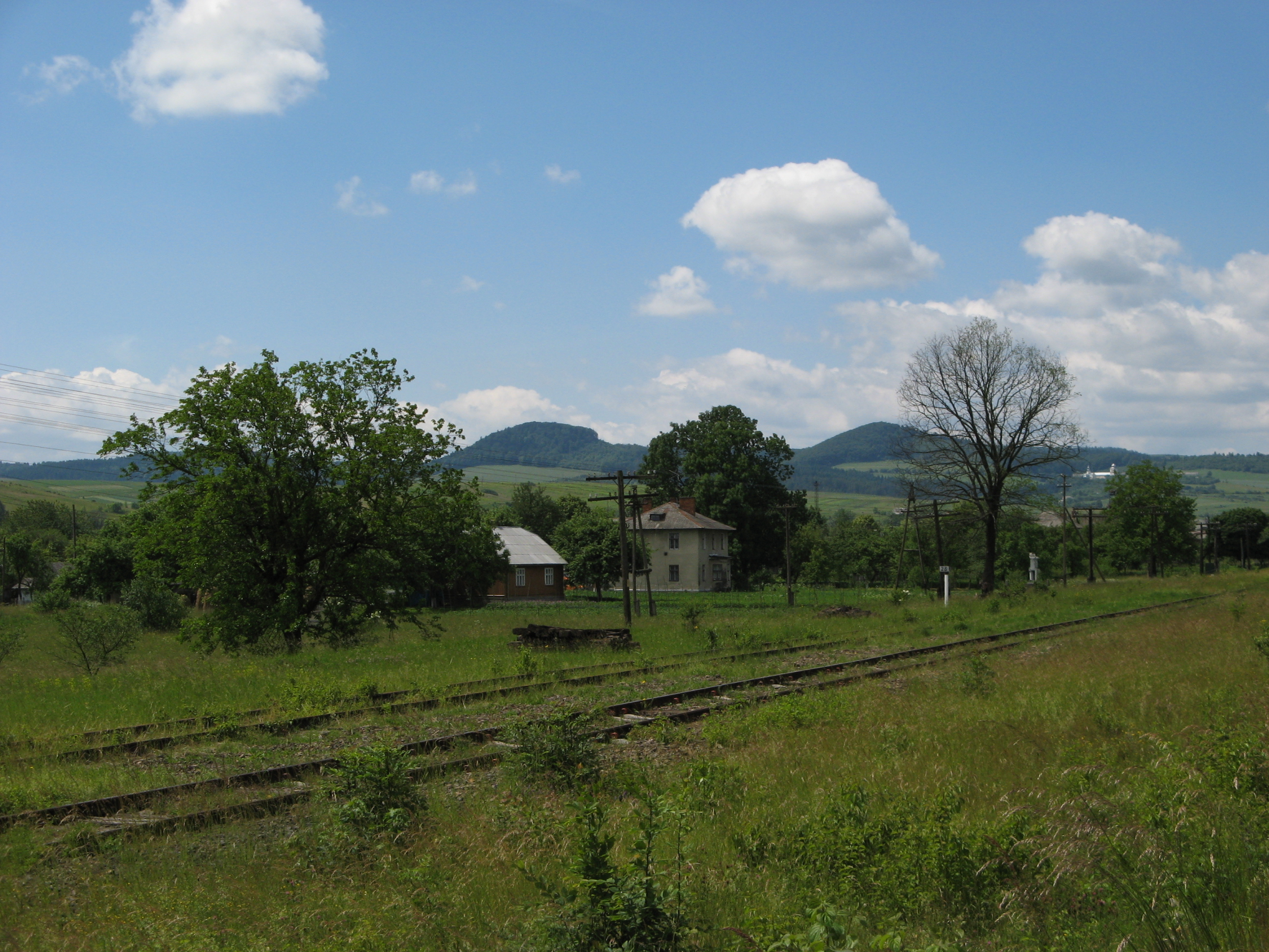 Перша угорсько-галицька залізниця. Місто Добромиль.